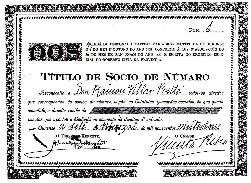 Título de socio de númaro